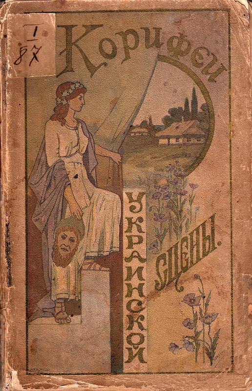 Обкладинка книги «Корифеї української сцени» (Київ, 1901)